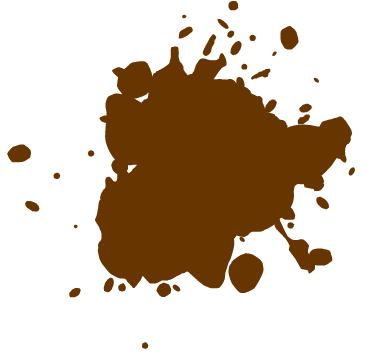 Brown